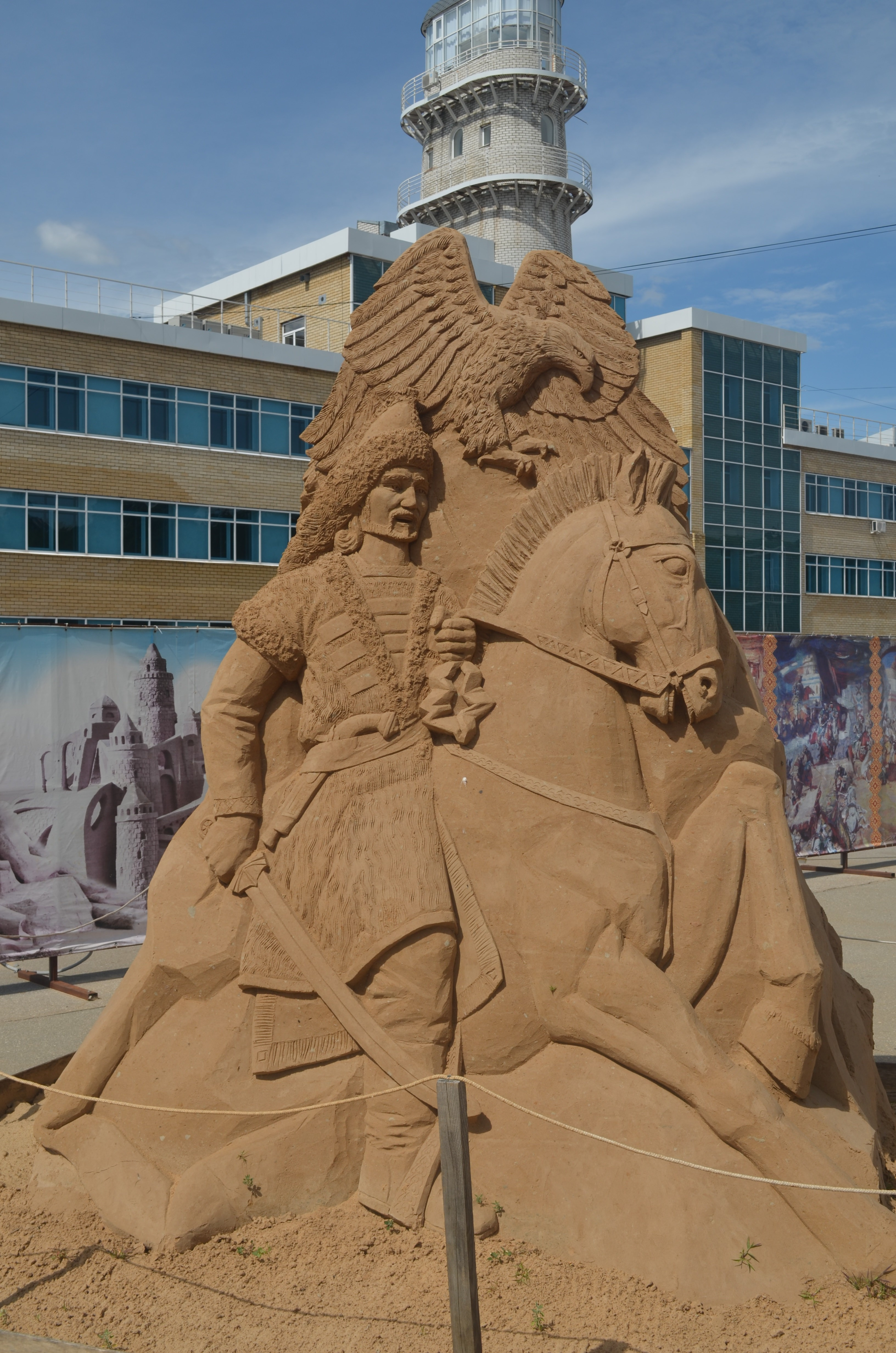 Пайдул (Байдул) Искеев. Выставка песчаных фигур, г.Чебоксары